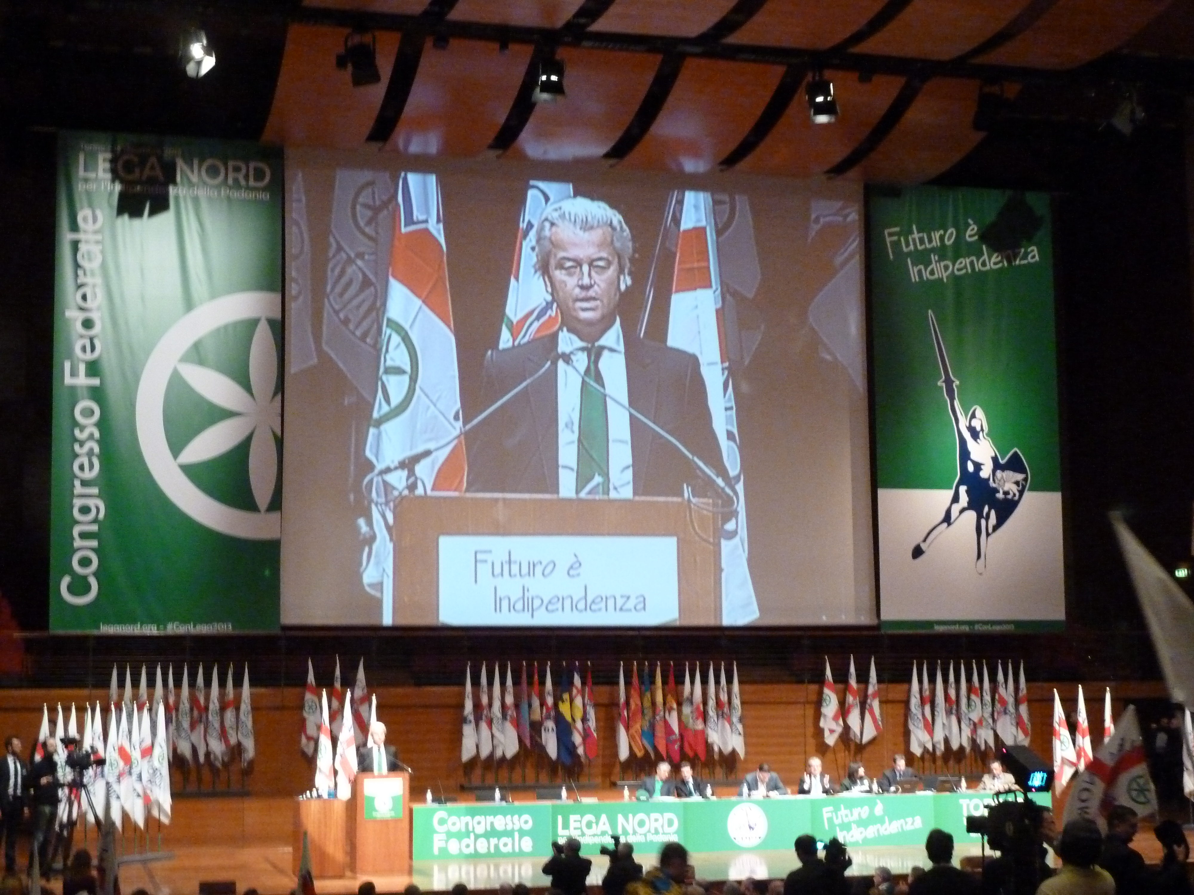 Congresso federale straordinario - Torino, 15 dicembre 2013.